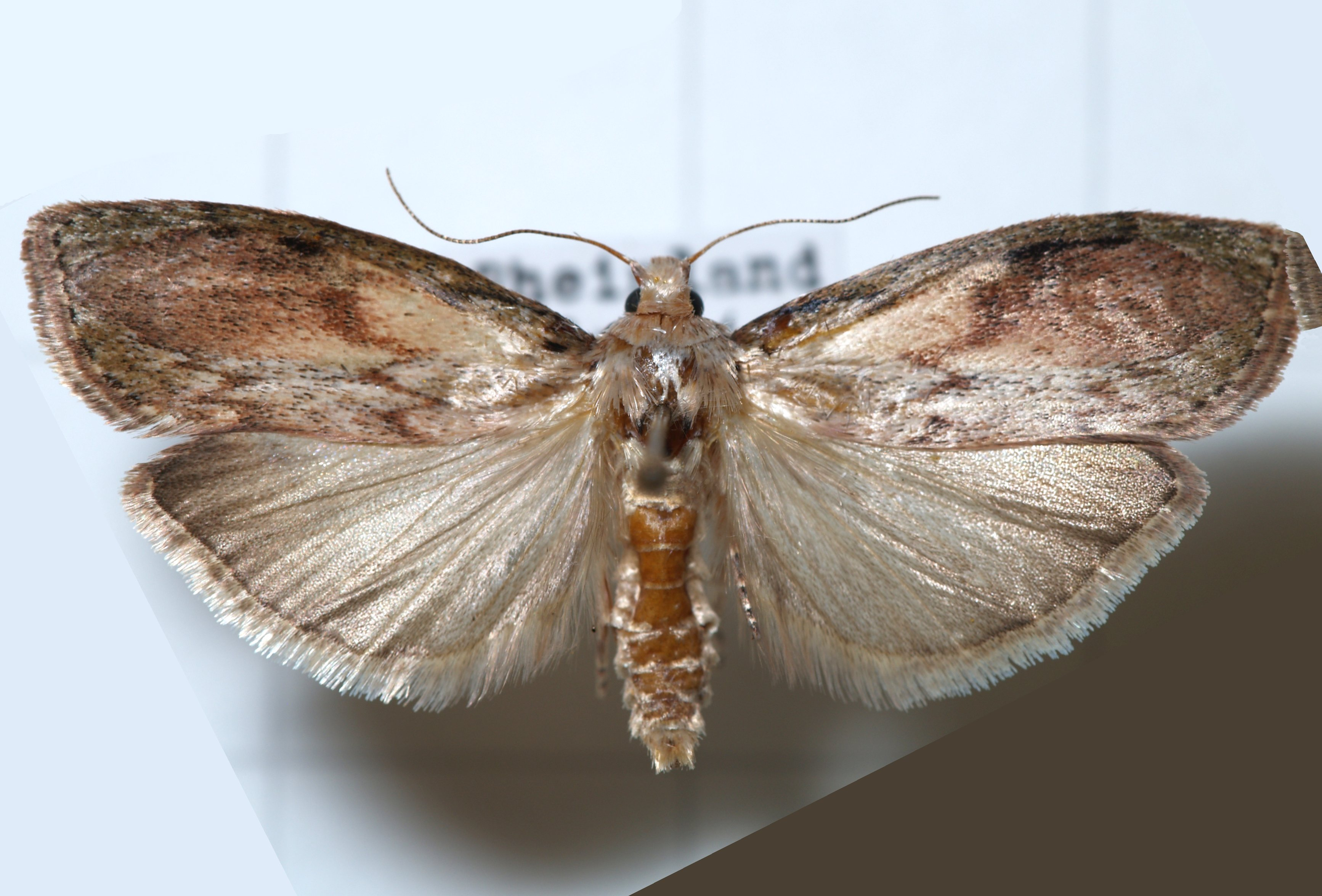 Aphomia sociella